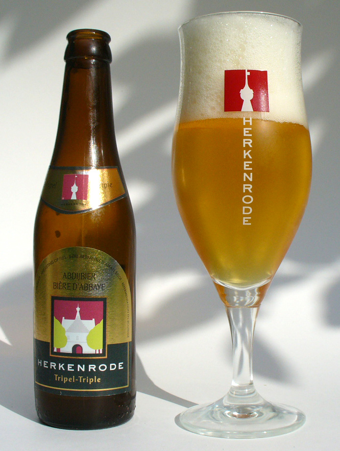 Abdijbier Herkenrode